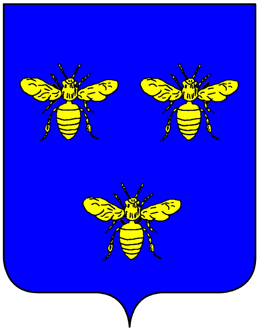 Stemma della famiglia Barberini